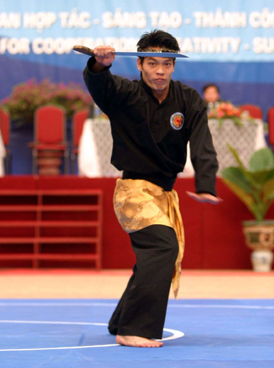 Các VĐV Pencak Silat hứa hẹn sẽ đem về nhiều HCV cho đoàn Việt Nam.